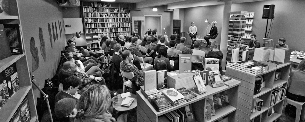 Arrangement i bokhandelen på Litteraturhuset i Bergen